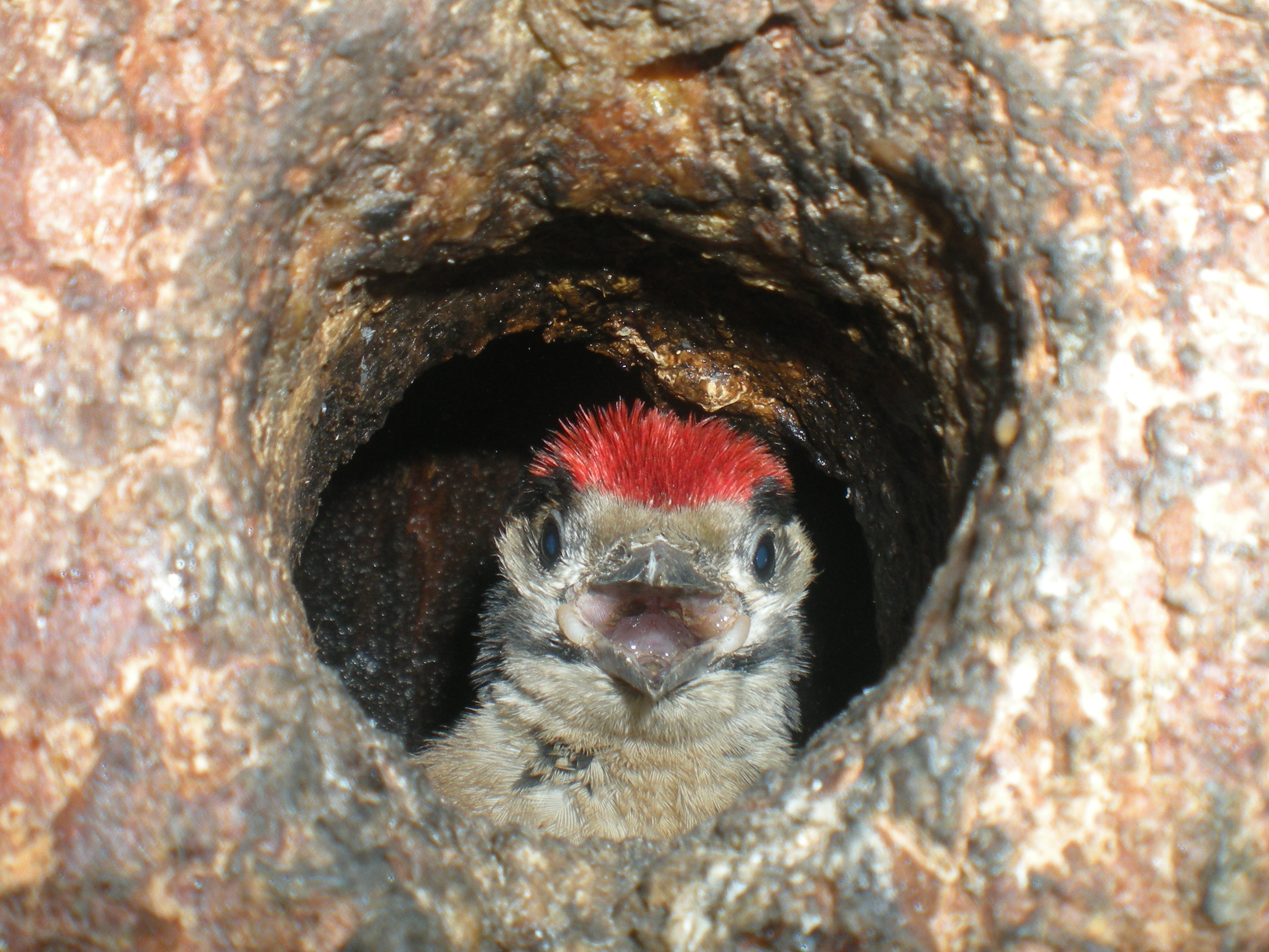 Dzięcioł duży (Dendrocopos major), Wólka Łękawska, Polska, 51°18'24"N, 19°23'34"E (51.3065, 19.3928)